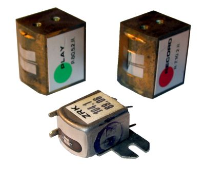 głowice elektromagnetyczne (magnetofonowe), polska stereofoniczna uniwersalna i dwie do studyjnego Mechlabora (węgierskie) zapisująca i odczytująca, w tej samej skali